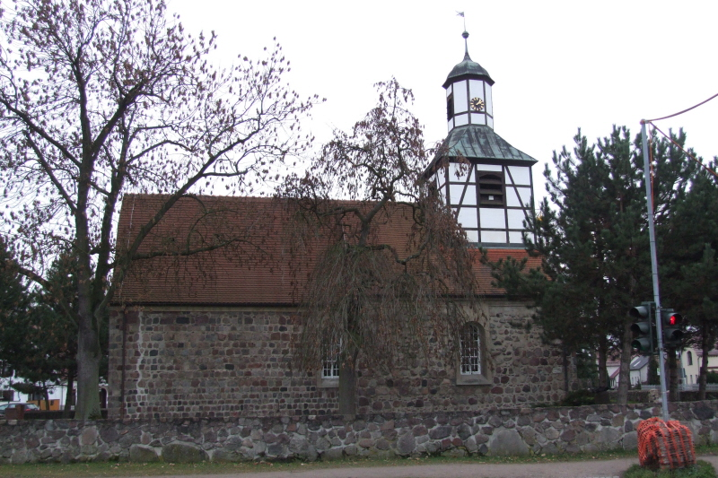 Dorfkirche Blankenfelde Fotograf: Harald Rossa Datum: November 2006 Höher aufgelöste Version ist verfügbar